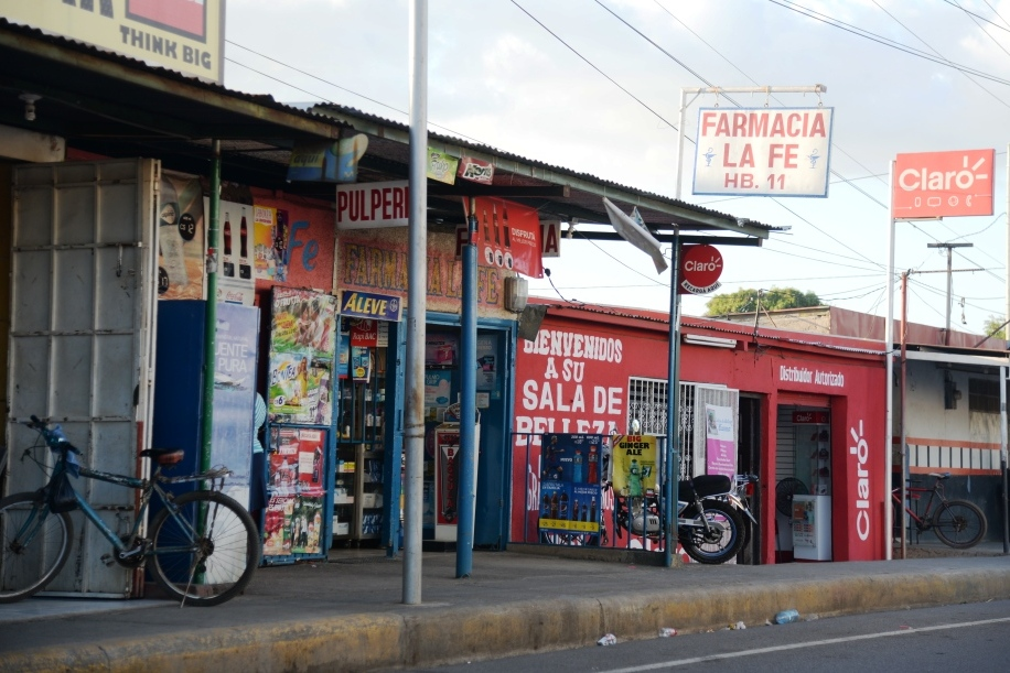 Una pulperia y otras tiendas en Tipitapa, en la carretera a Masaya.